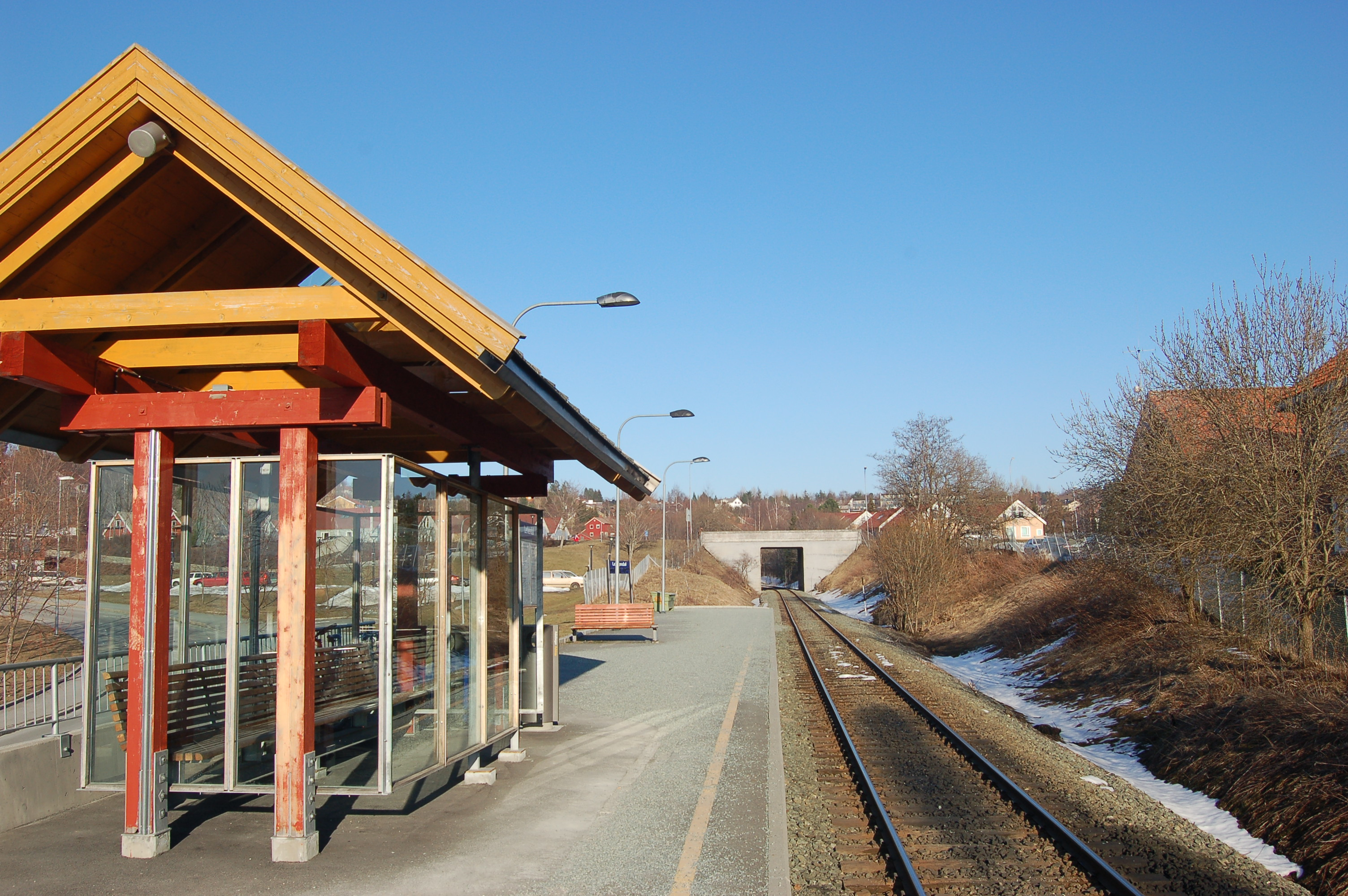 Lerkendal Station in Trondheim, Norway